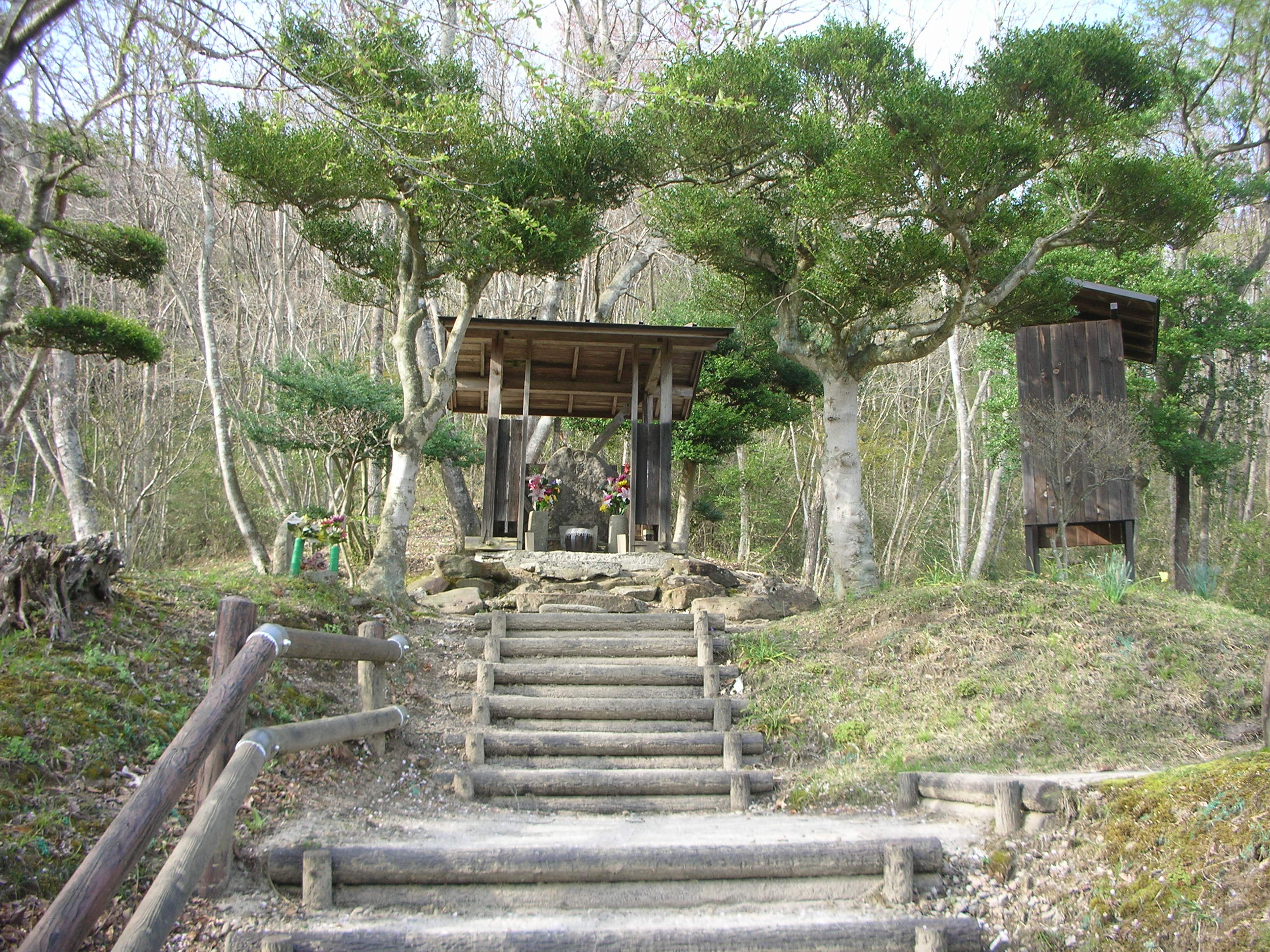 支倉常長メモリアルパーク